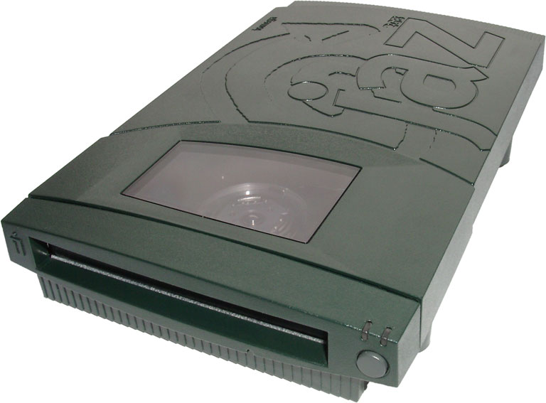 Motiv: Externes Speicherlaufwerk vom Typ jaz 2 GB der Firma iomega. Mit diesem Speicherlaufwerk können bis zu 2 GB unkomprimierte Daten auf einer jaz-Disk gespeichert werden. Mit dem Vorläufer dieses Gerätes konnte 1 GB auf einer jaz-Disk gespeichert werden. Sowohl Laufwerk als auch Medium der 1 und 2 GB-Variante unterscheiden sich. Die 2 GB-Variante ist in der Lage auch 1 GB-Disks zu lesen. Allerdings können diese nicht in einem 2 -Laufwerk formatiert werden. Die Abmessungen des Laufwerks betragen ca. 132 mm × 213 mm × 39 mm. Das Gerät kann über eine SCSI-Schnittstelle an einen Computer angeschlossen werden. Es verfügt über zwei Taster zum Einstellen der SCSI-ID sowie einen Schalter um die SCSI-Kette zu terminieren. Fotograf: KMJ Aufnahmedatum: 2004-06-26 Aufnahmeort: Studio Bildname: Iomega_jaz-2-GB-Laufwerk_01_KMJ.jpg Bildgröße: 768 Pixel x 567 Pixel (49.782 Bytes) Stichworte: EDV, Datenspeicherung, Festplatte, Diskette, SCSI, extern, iomega, jaz